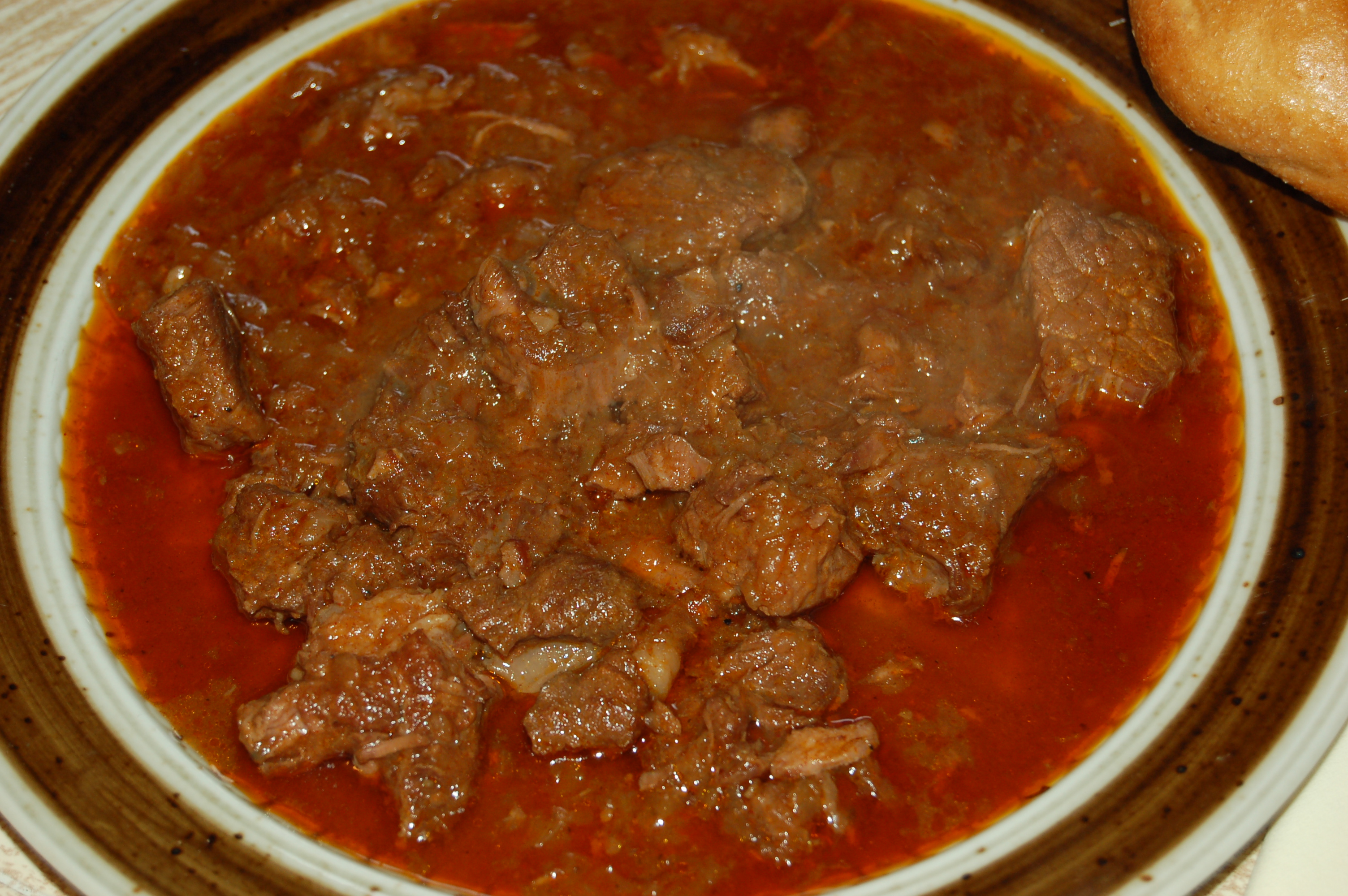 Rindsgulasch, Österreich